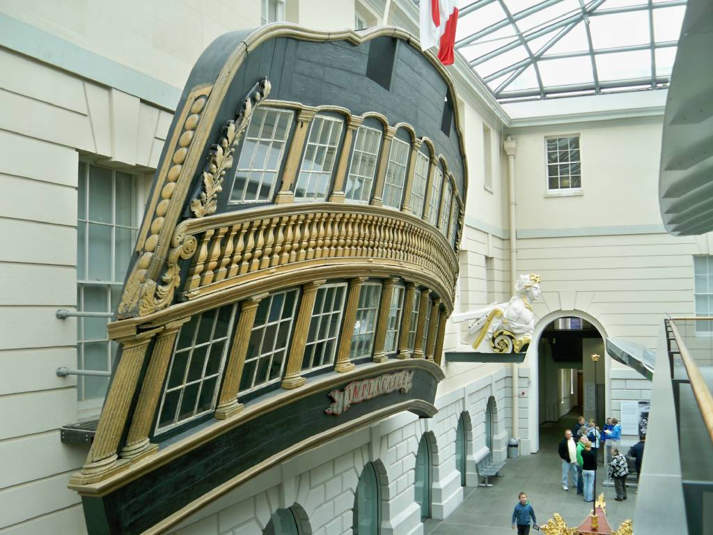 HMS Implacable